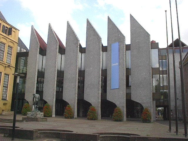 Gemeentehuis van Zwolle